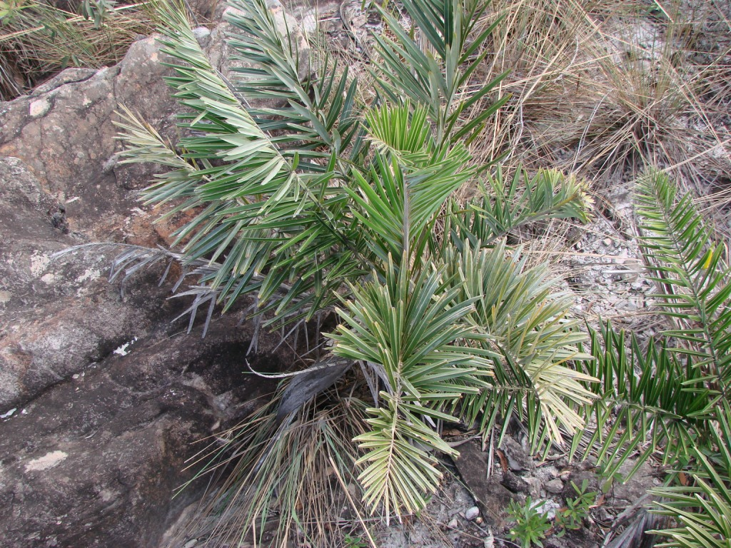 Syagrus glaucescens Glaz. ex Becc. - ARECACEAE - Parque Estadual do Biribiri - Serra do Espinhaço - Diamantina - Minas Gerais - Brasil.